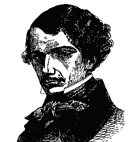 retrato de Francisco_Navarro_Villoslada